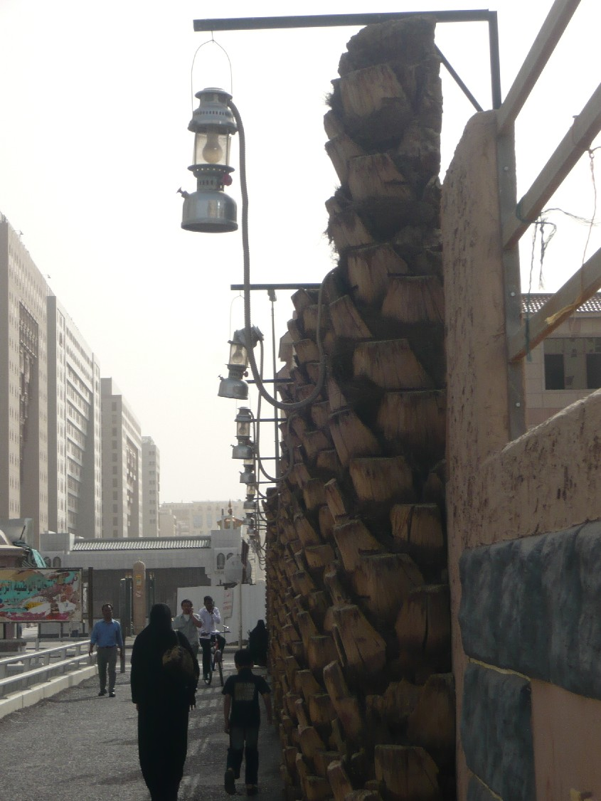 ഹദീഖത്തു ബൈഅയുടെ ചുറ്റുമതിൽ